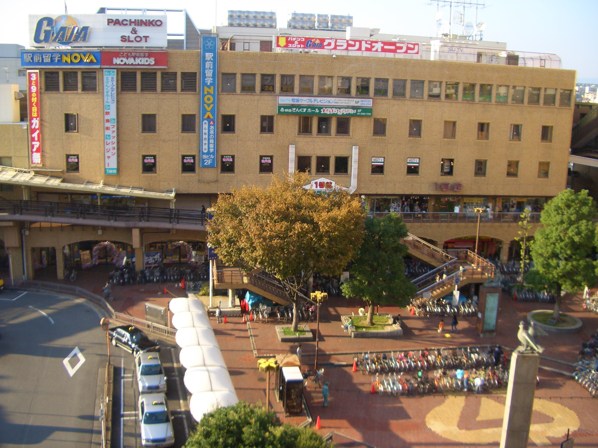 Suita_Thanks_1st_BLD in Suita City,Osaka,Japan 吹田さんくす一番館。吹田さんくす3番館５階から撮影。